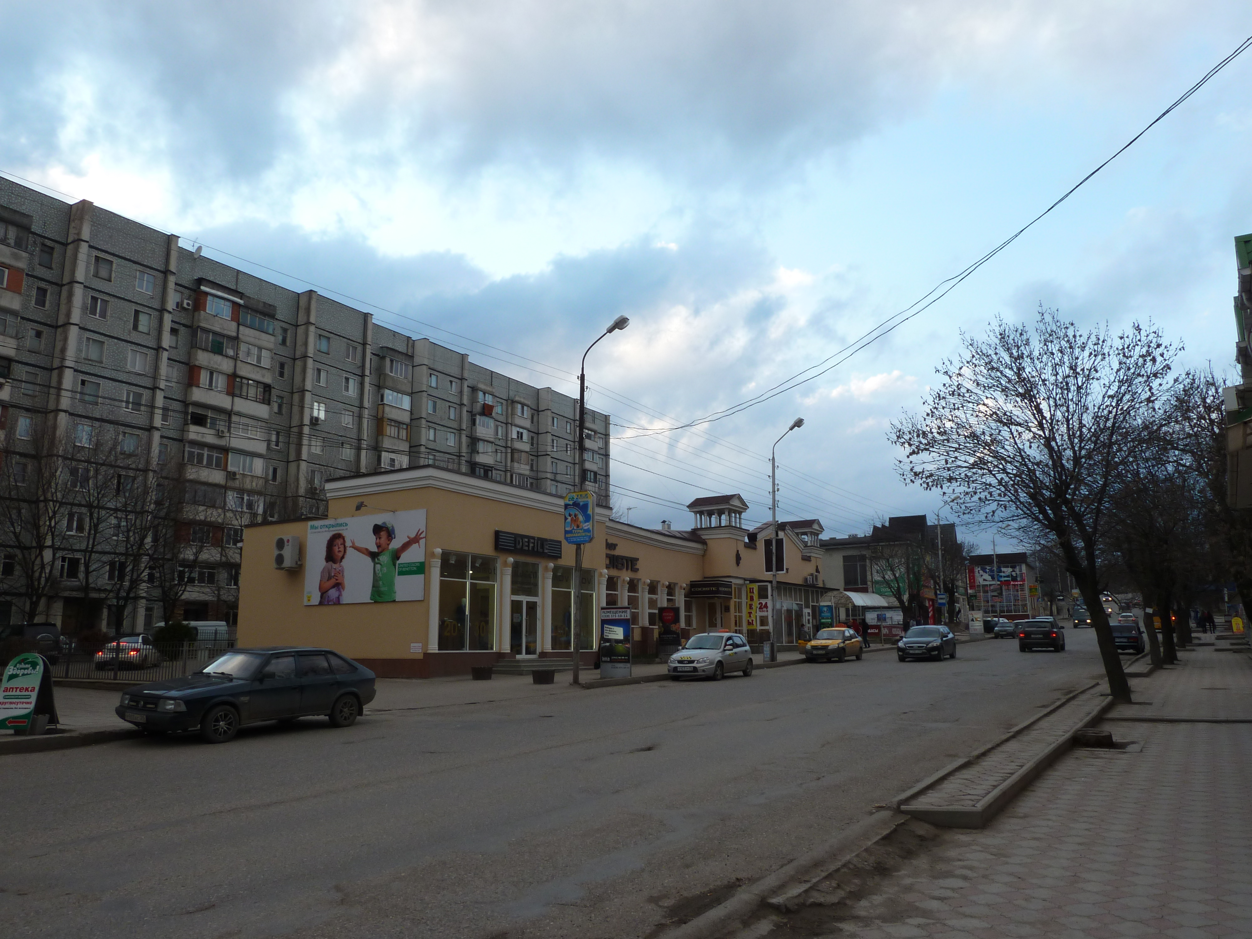 Улица Володарского в Ессентуках